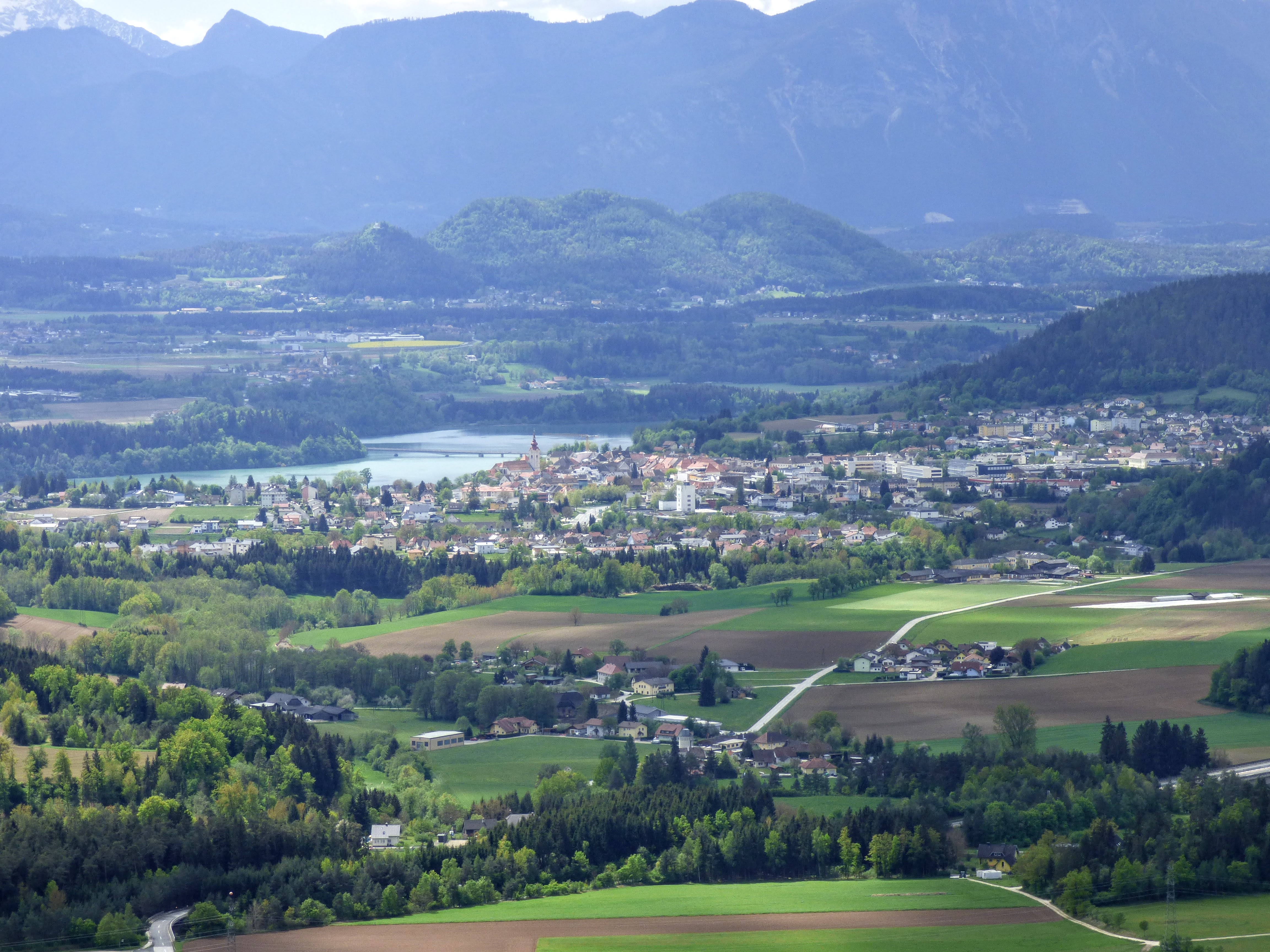 Blick vom Haimburgerberg (Ruine Rauterburg) nach Völkermarkt und Stausee